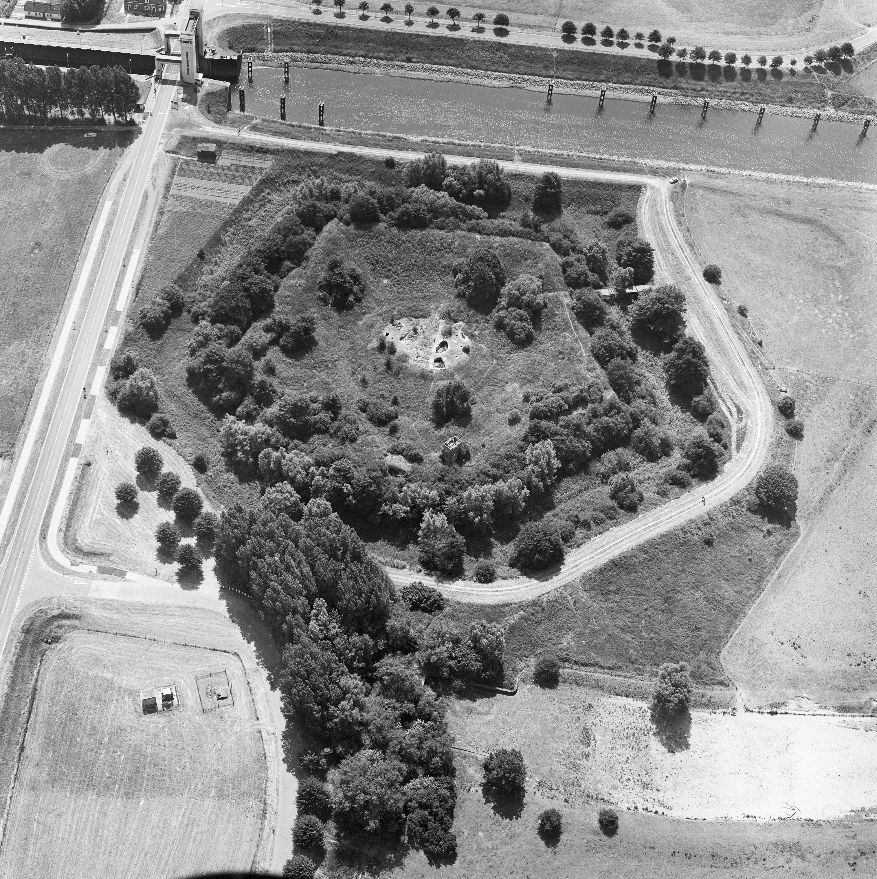 Overzichten: luchtfoto